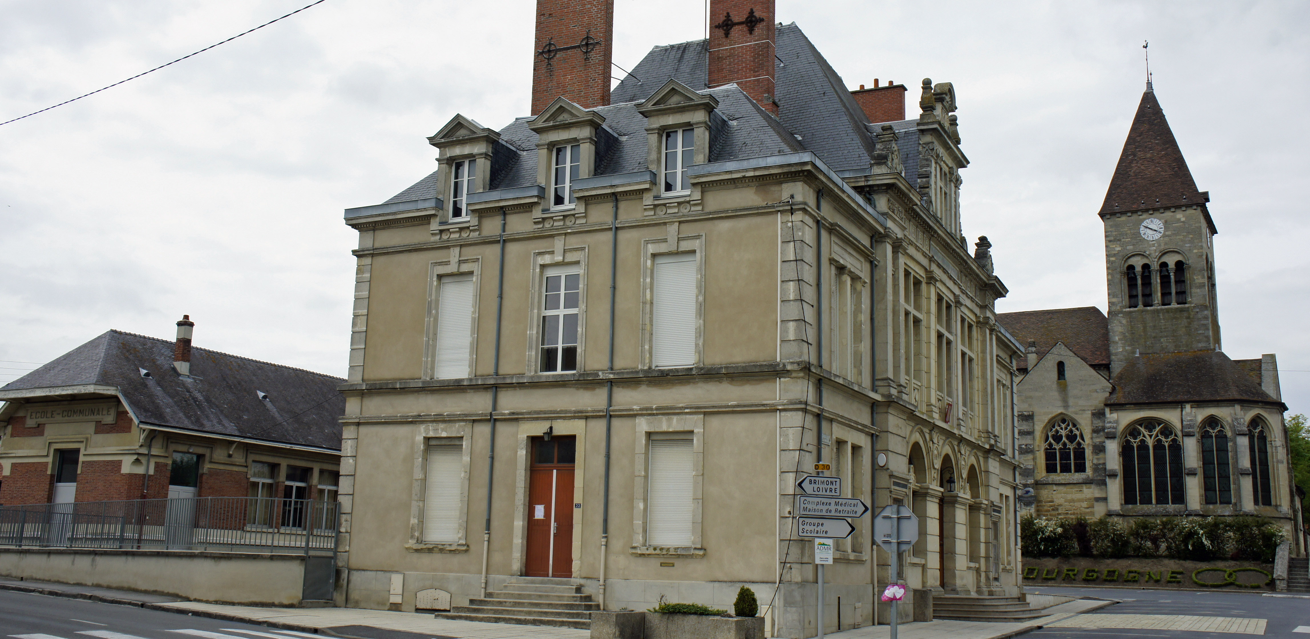 Église mairie et école à Bourgogne .